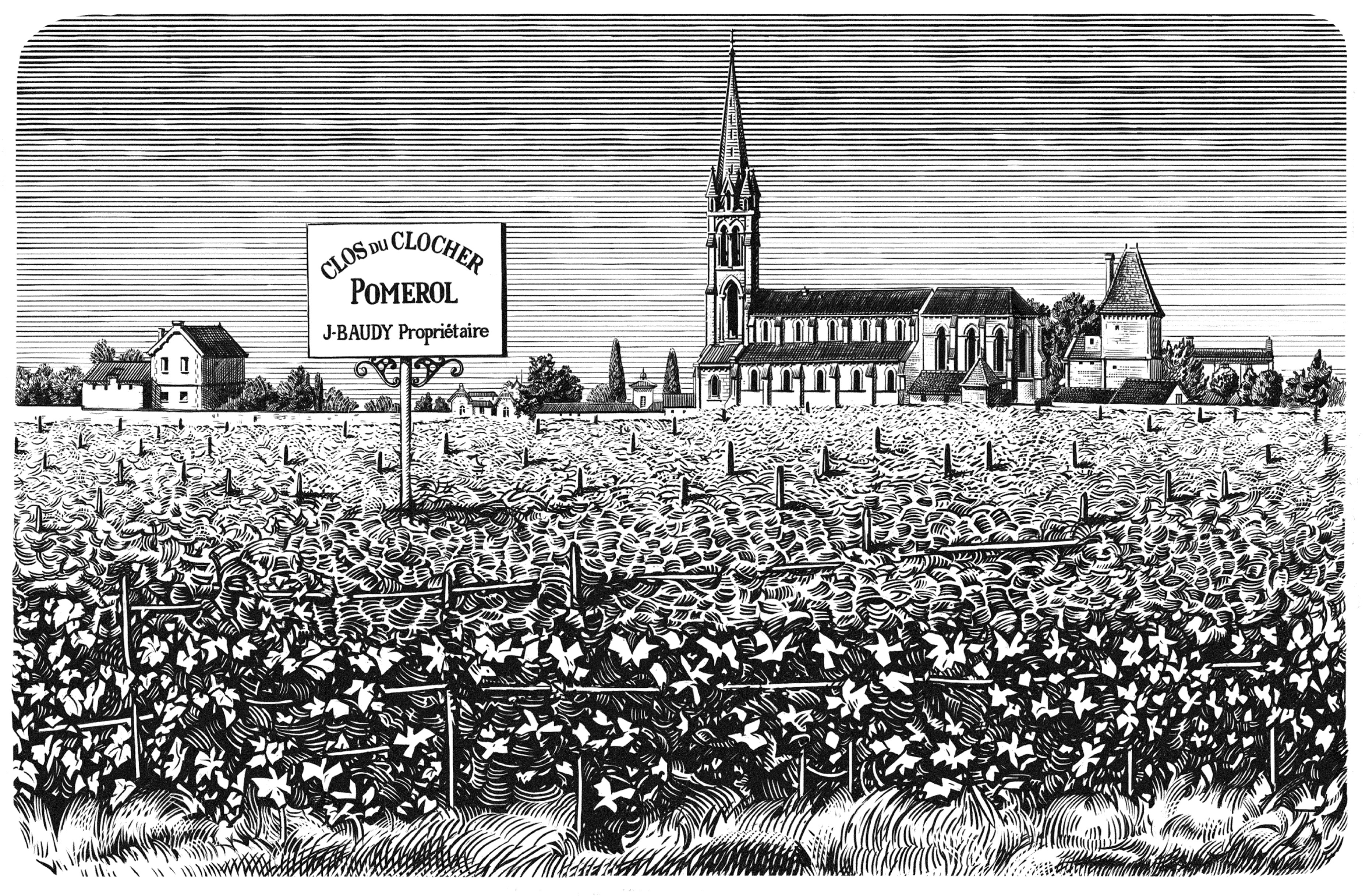 gravure étiquette Clos du Clocher